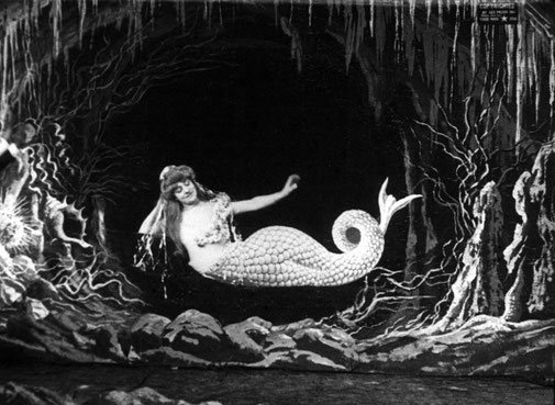 Image du film La Sirène (1904) de George Méliès